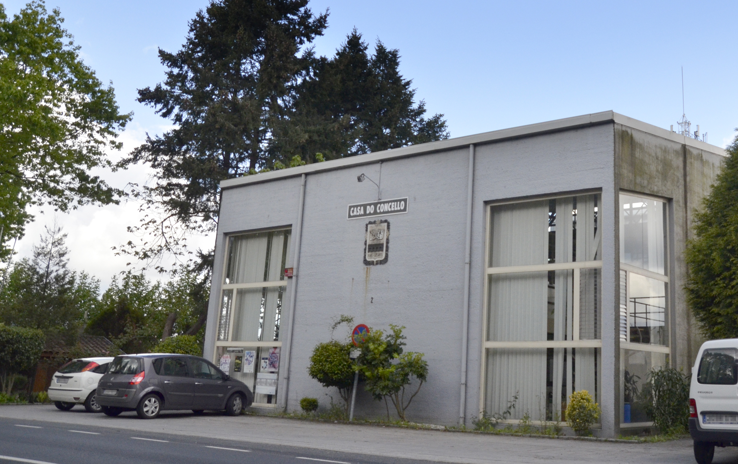 Casa do Concello de Pontecesures. Datos do Instituto Geográfico Nacional Altitude: 19m (sobre o nivel medio do Mediterráneo en Alacant) Latitude: 42º 43' 18,4 N Lonxitude: 8º 39' 04,1 O Sistema de referencia: ETRS89